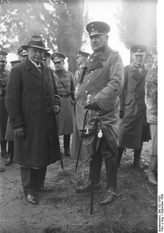 Die grosse Rahmenübung der Reichswehr in Unterfranken in der Gegend Königshofen unter Anwesenheit des Reichspräsidenten von Hindenburg, des Reichswehrministers Dr. Groener und vieler ausländischer Militär-Attaches. Reichspräsident von Hindenburg und Reichswehrminister Dr. Groener im Manövergelände.